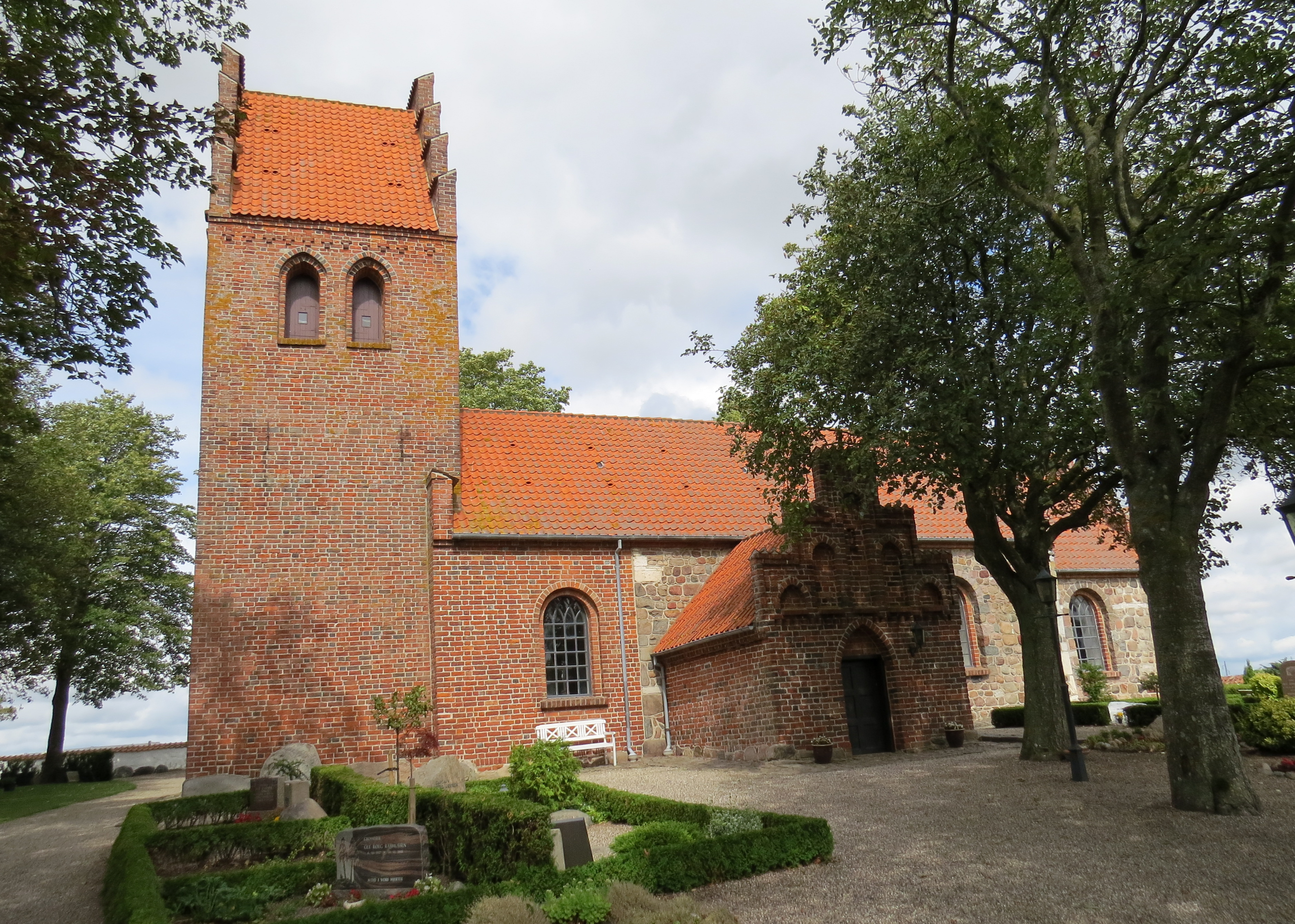 Snostrup Kirke i Snostrup, Sjælland